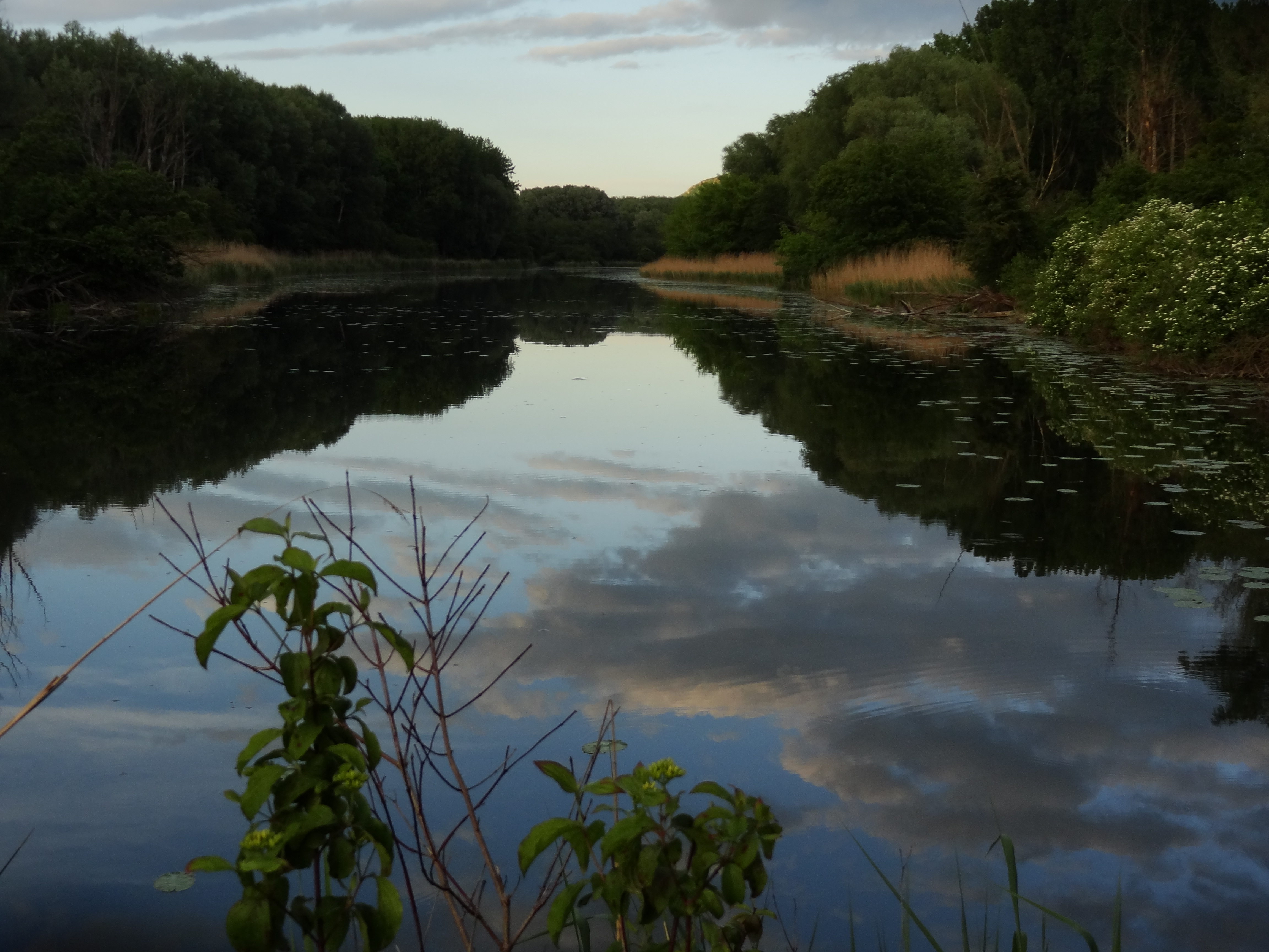 Rosskopfarm, Altarm bei Stopfenreuth This file shows the National Park Donau-Auen in Austria.